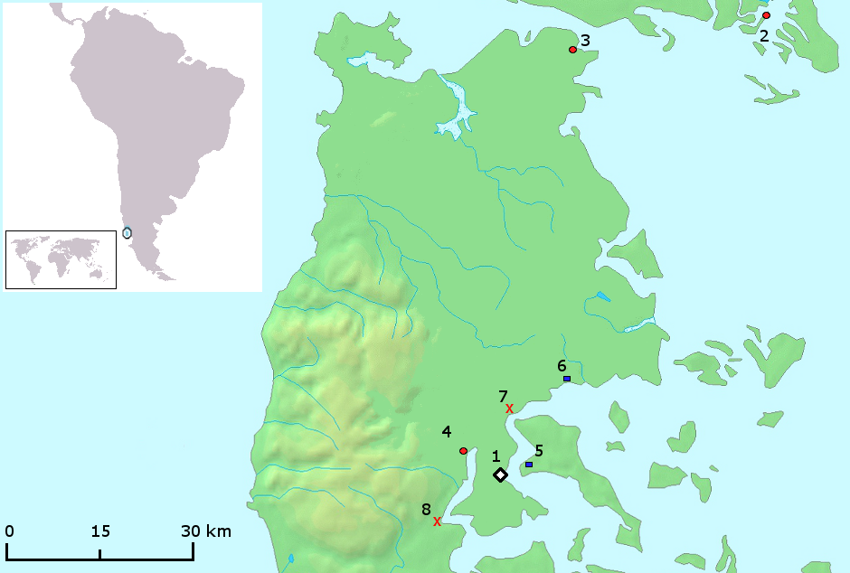 Mapa de la rebelión huilliche de 1712 (en azul los campamentos huilliches, en rojo los fuertes españoles, en blanco el punto de organización de la rebelión y una x para los combates): 1. Quilquico, 2. Fuerte de Calbuco, 3. Fuerte de Chacao, 4. Castro, 5. Campamento de Huenao, 6. Campamento de Quetalco, 7. Dalcahue, 8. Rauco.